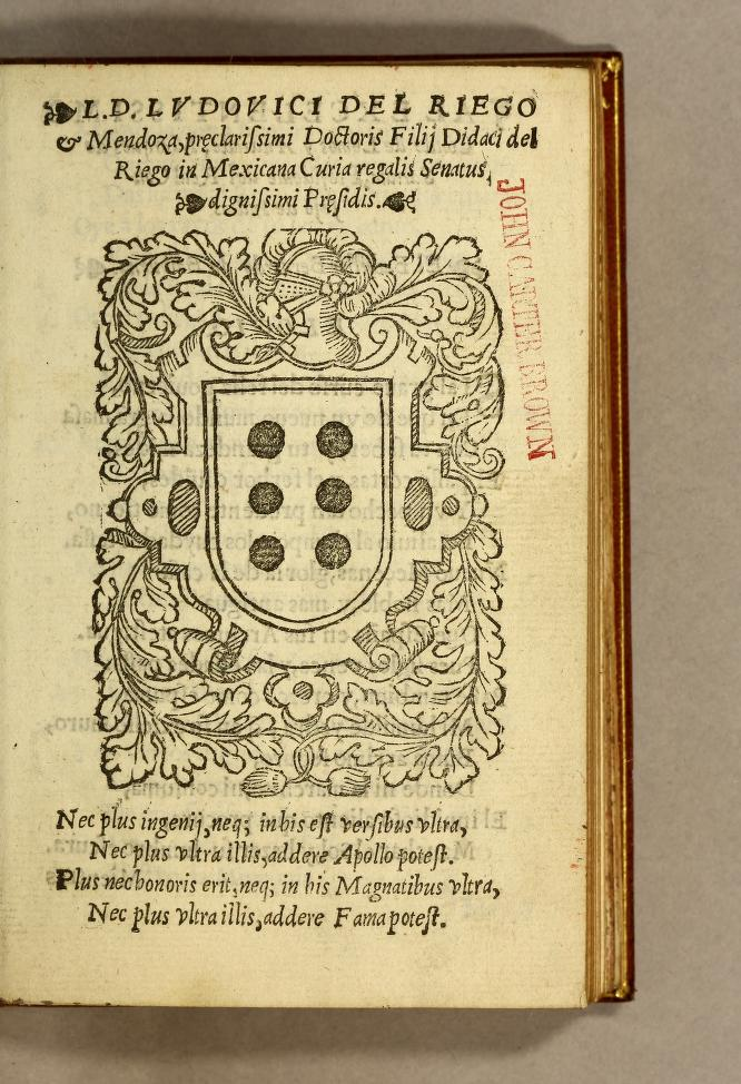 Xilografía en la edición de López Dávalos